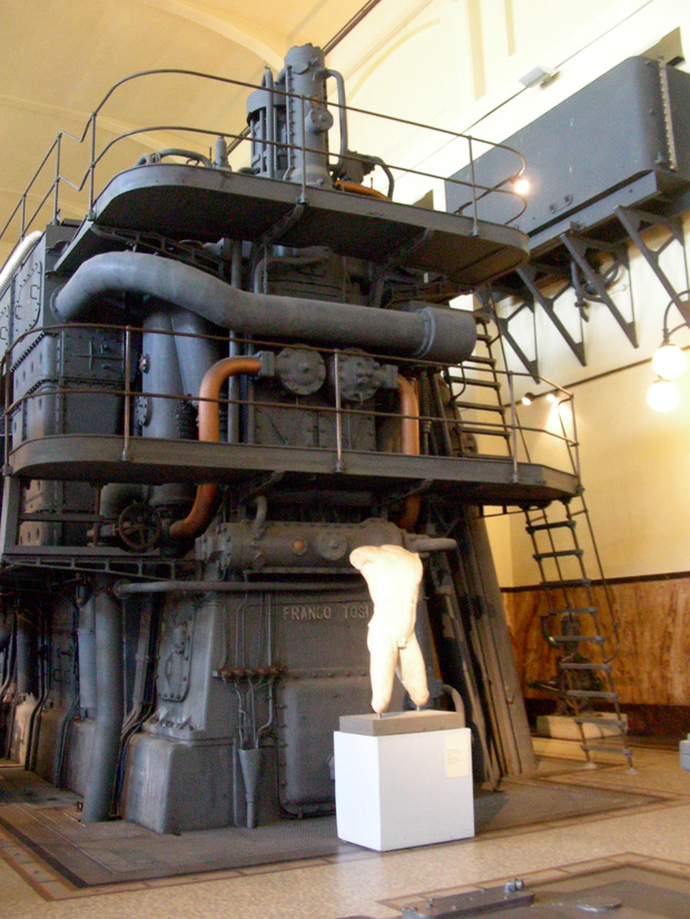 Roma, Centrale Montemartini (Musei Capitolini), "sala Macchine" progettata dall'azienda legnanese "Franco Tosi Meccanica" Centrale Montemartini Native nameCentrale MontemartiniLocationRome, ItalyCoordinates41° 52′ 00.48″ N, 12° 28′ 41.12″ E Established2005Web page control : Q1054090 VIAF: 268486794 GND: 10105941-3 institution QS:P195,Q1054090